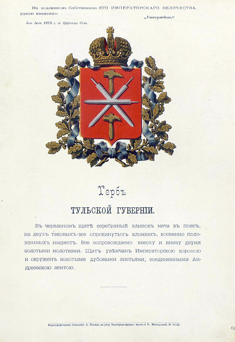 Official Russian Empire coat of arms Tula Governorate. Герб Российской Империи Тульской губернии с официальным описанием в Гербовнике Бенке. Утверждён Императором Всероссийским Александром Вторым в 1856 году.